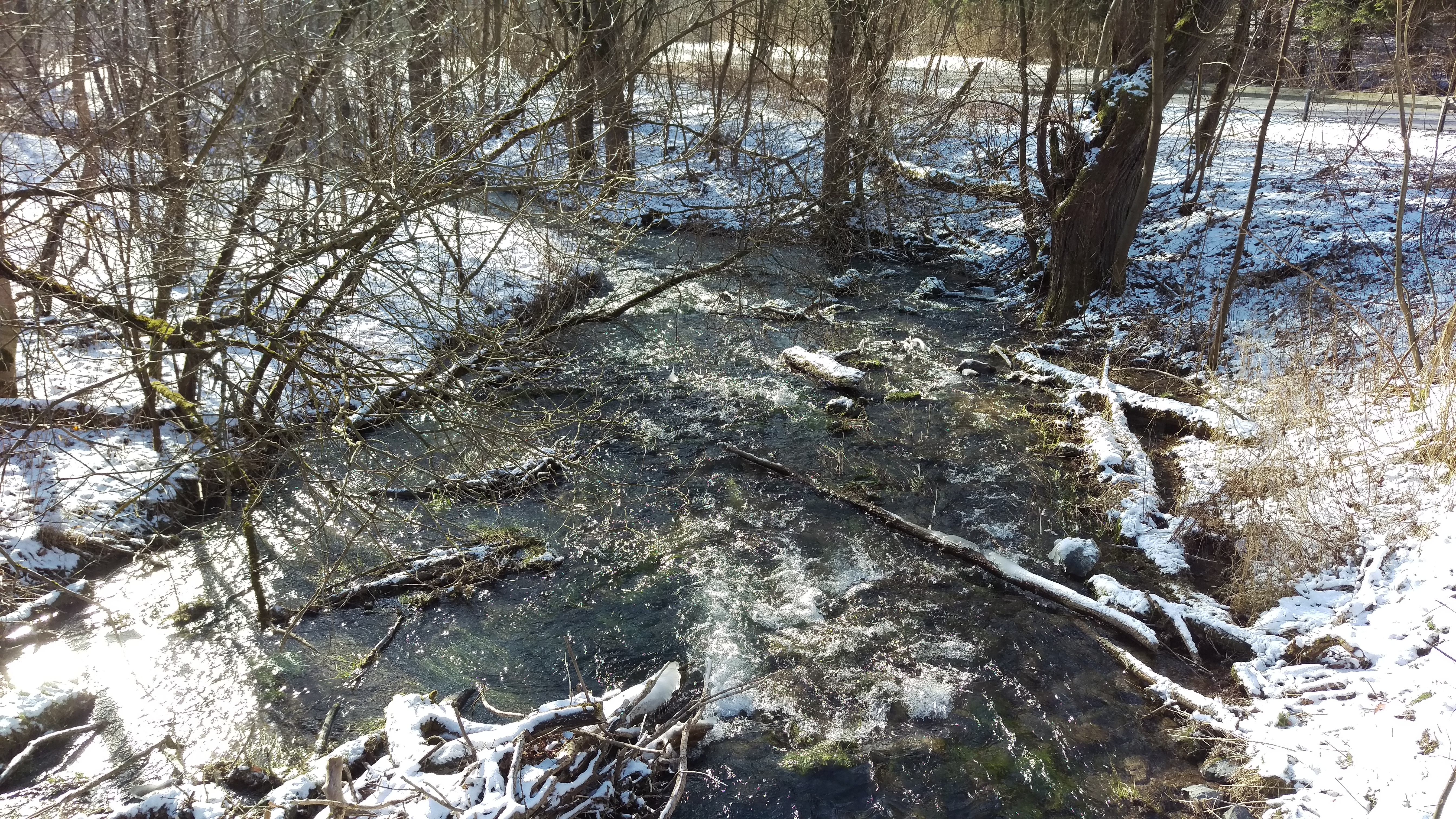 Die Helbe zwischen Dietenborn und Toba im thüringischen Kyffhäuserkreis.